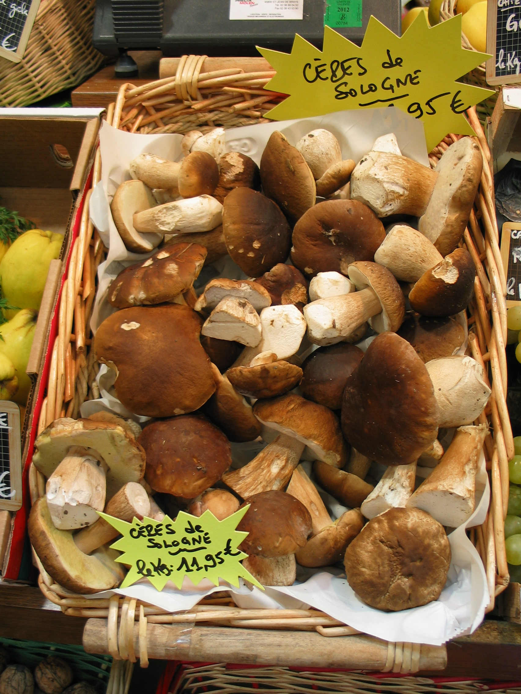 Cèpes de Sologne vendus chez un marchand des halles d'Orléans.